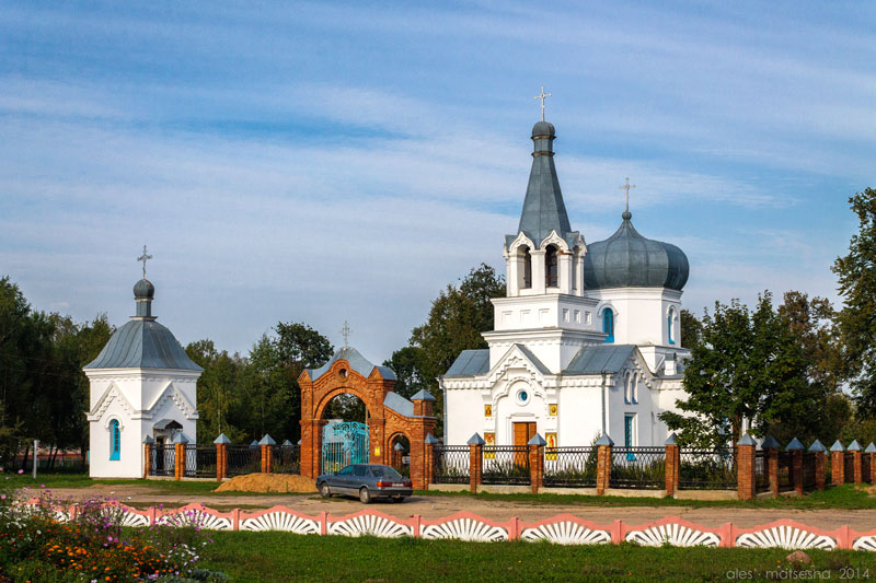 Крапіўна. Царква Св. Аляксандра Неўскага